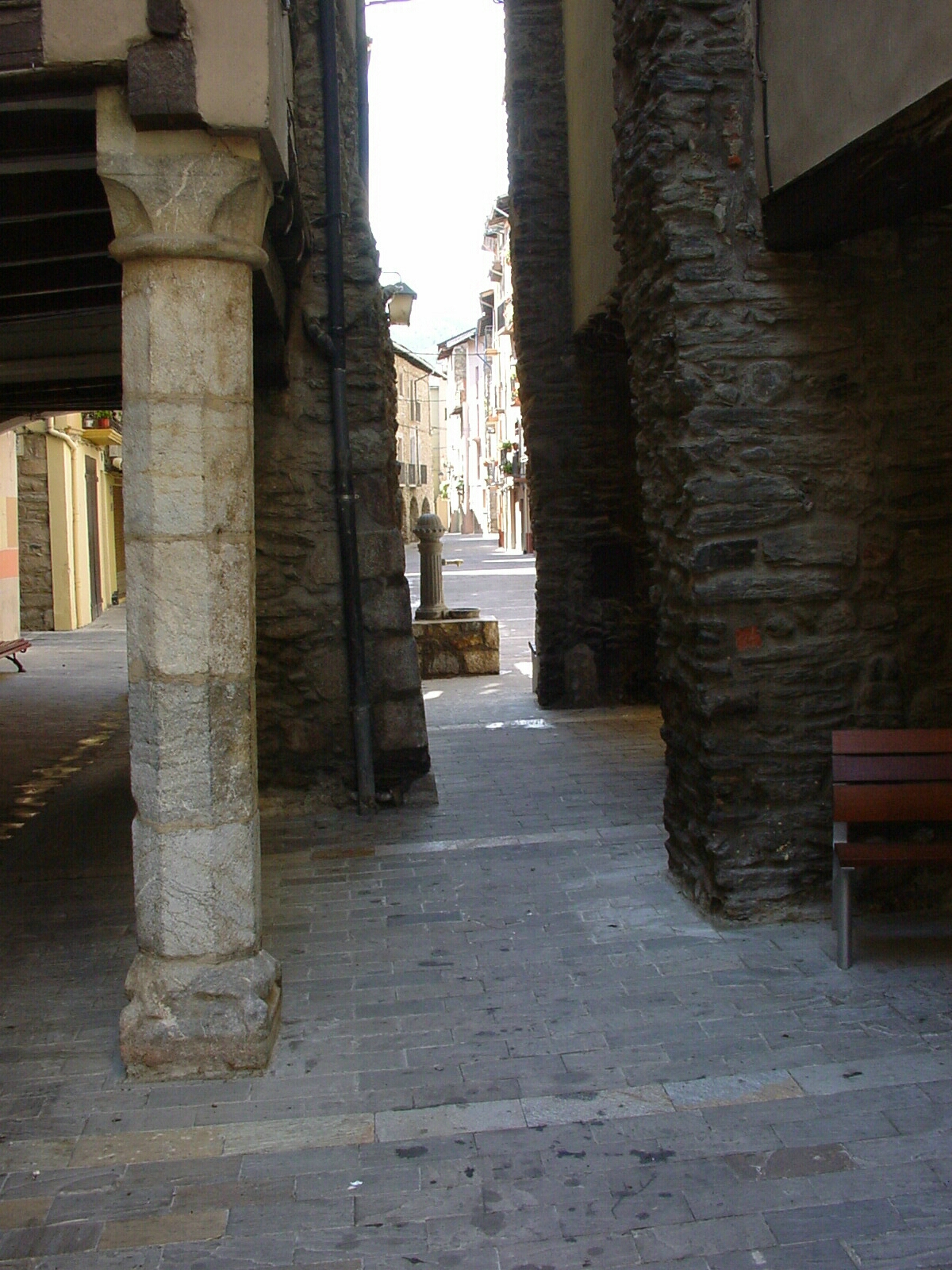 Seo de Urgel Ansicht